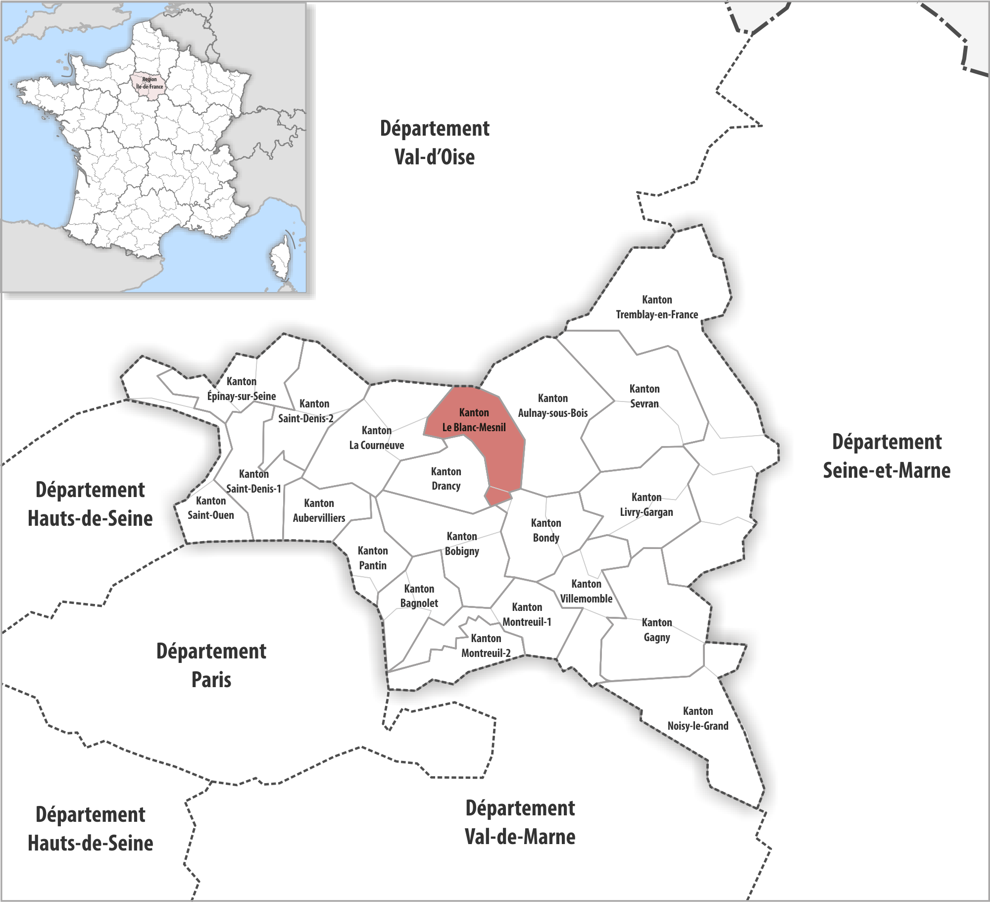 Lage des Kantons Le Blanc-Mesnil